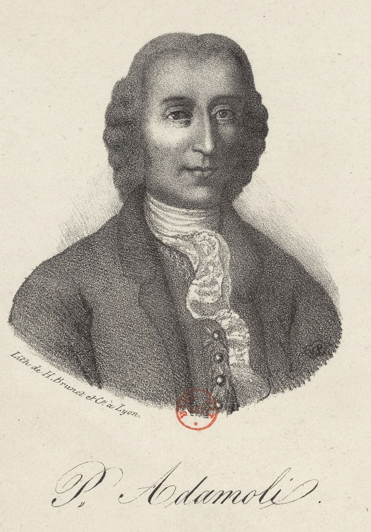 Portrait de Pierre Adamoli (XVIIIe s.)